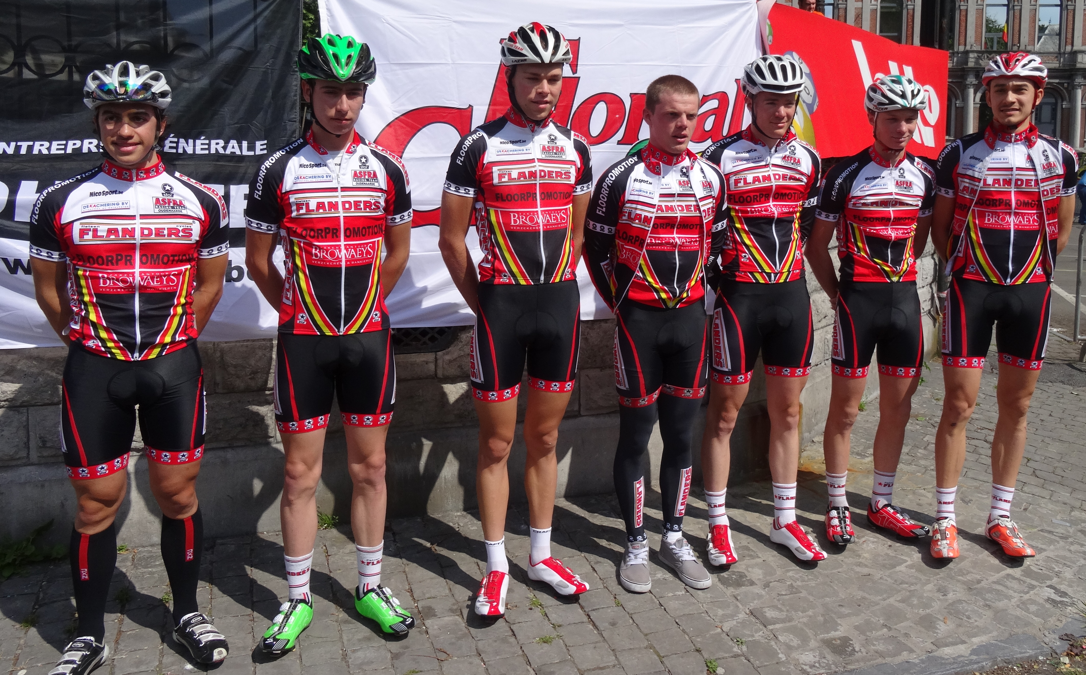 Reportage réalisé le samedi 17 mai à l'occasion du départ du Grand Prix Criquielion 2014 à Boussu, Belgique.